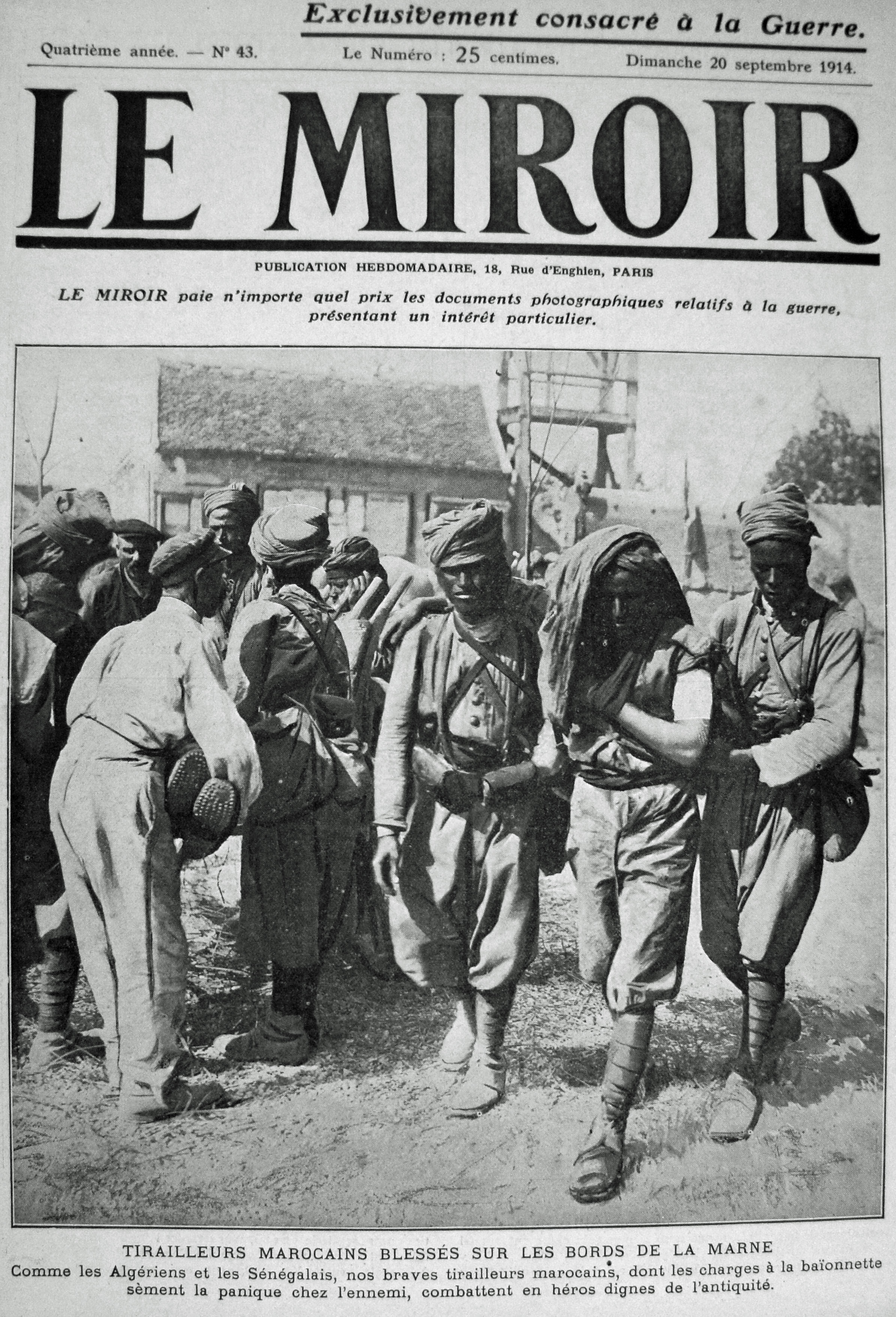 extrait du journal "le miroir".